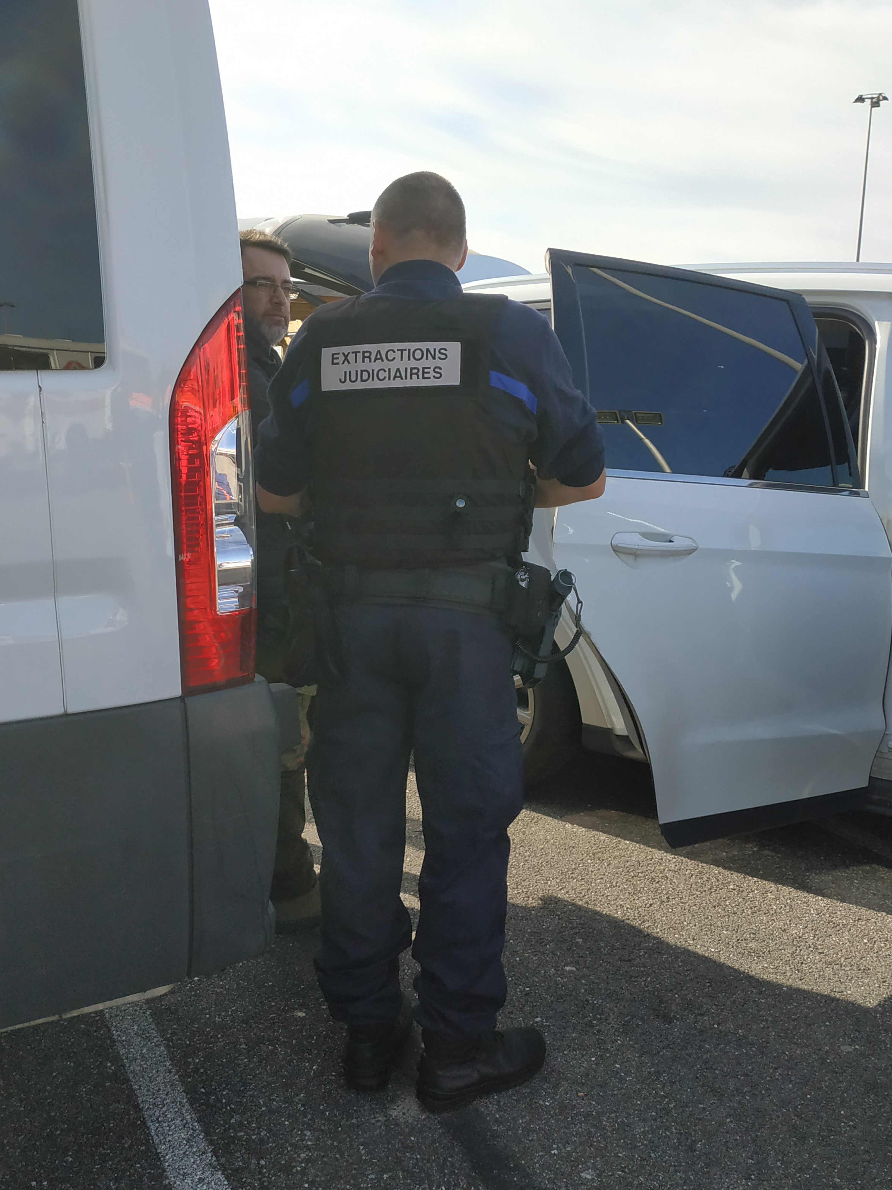 Officier chargé des extractions judiciaires pour le Ministère de la justice, Photo prise à Mundolsheim dans le cadre des rencontres de la sécurité intérieure de 2019